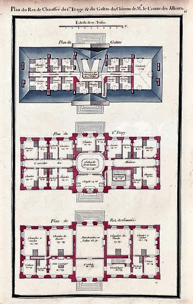 Plan du château de Cherperine, extrait des œuvres d'architecture de Pierre-Alexis Delamair envoyées à l'Électeur de Bavière en 1714